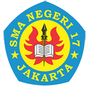 Logo SMA Negeri 17 Jakarta